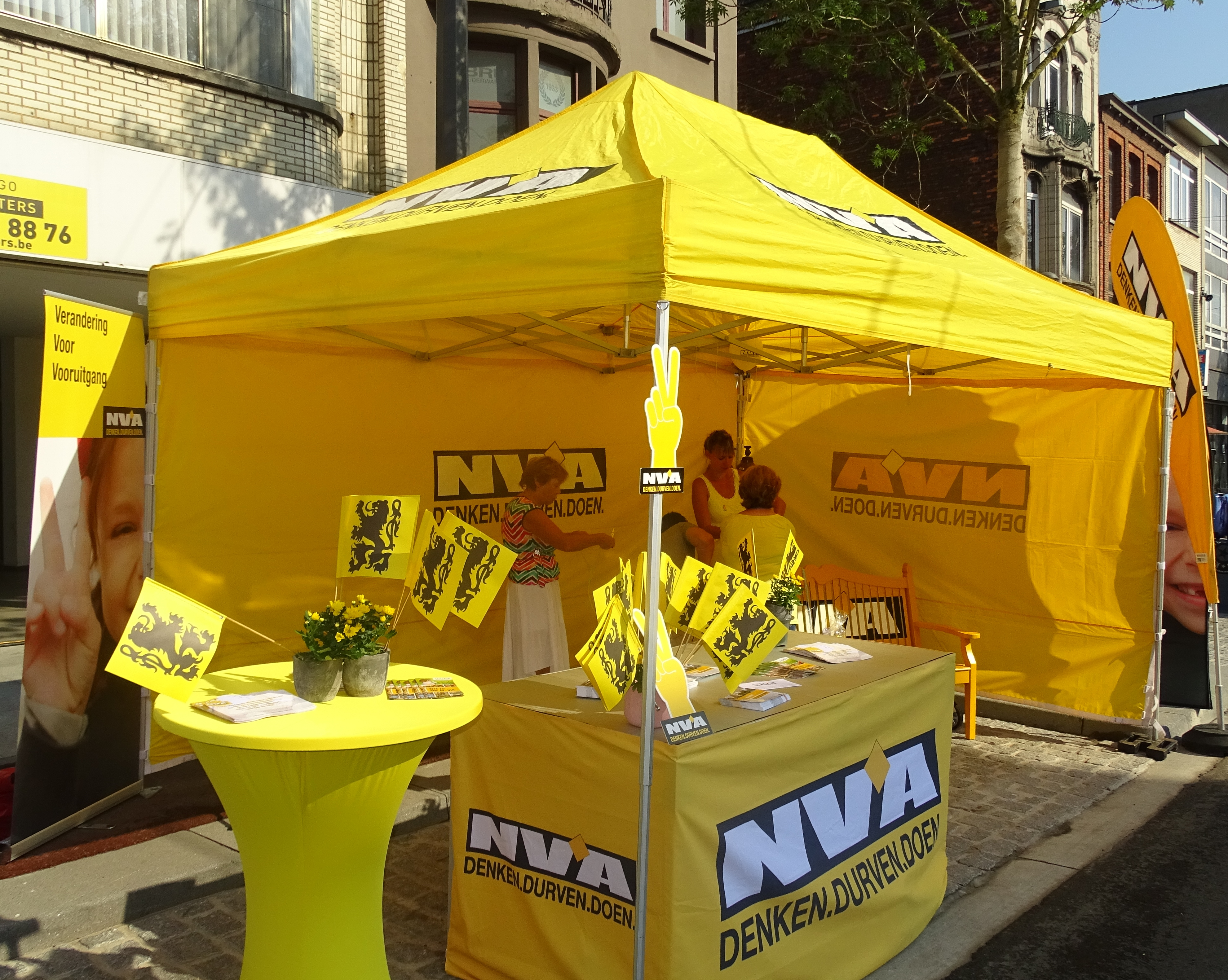 Reportage réalisé le dimanche 30 août à l'occasion du départ et de l'arrivée de la Coupe Sels 2015 à Merksem (Anvers), Belgique.